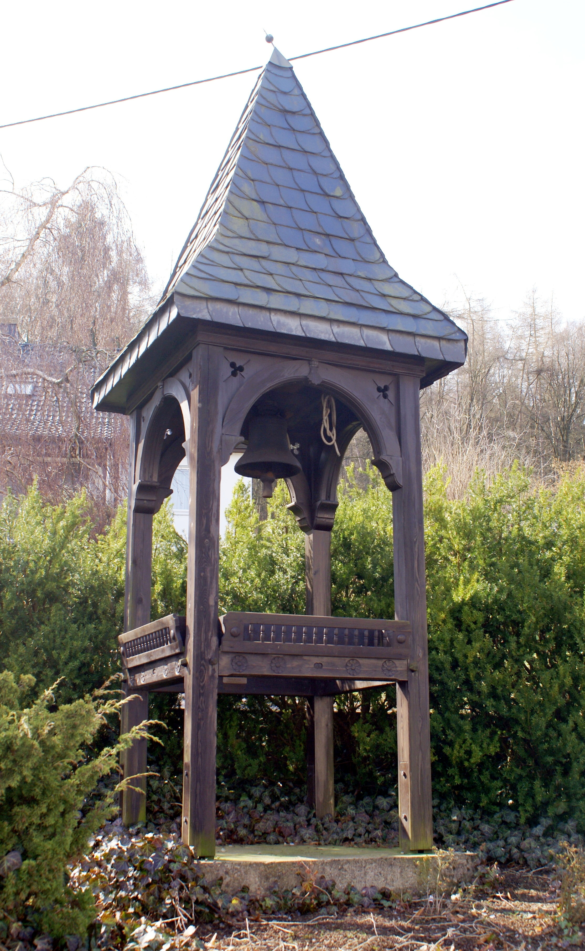 ehemalige Glocke der Volksschule Brockhausen, heute Teil des Kriegsmahnmals